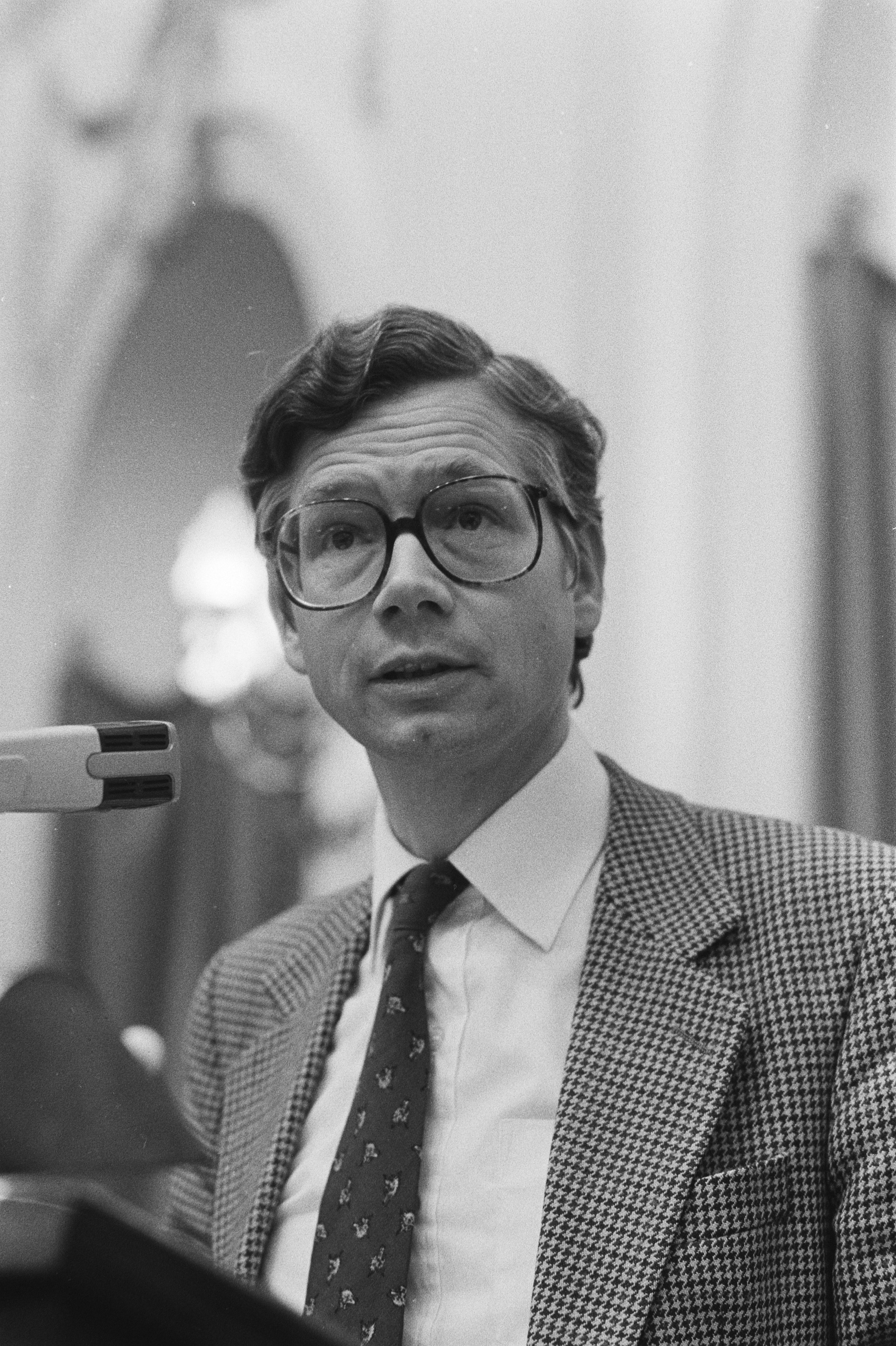 Collectie / Archief : Fotocollectie Anefo Reportage / Serie : Tweede Kamer is bijeen over de levering van duikboten aan Taiwan Beschrijving : Kamerlid Joost van Iersel aan het woord Datum : 3 februari 1981 Locatie : Binnenhof, Den Haag, Zuid-Holland Trefwoorden : microfoons, parlementaire debatten, parlementariërs, parlementen Persoonsnaam : Iersel, Joost van Fotograaf : Marcel Antonisse Auteursrechthebbende : Nationaal Archief Materiaalsoort : Negatief (zwart/wit) Nummer archiefinventaris : bekijk toegang 2.24.01.05 Bestanddeelnummer : 931-3007